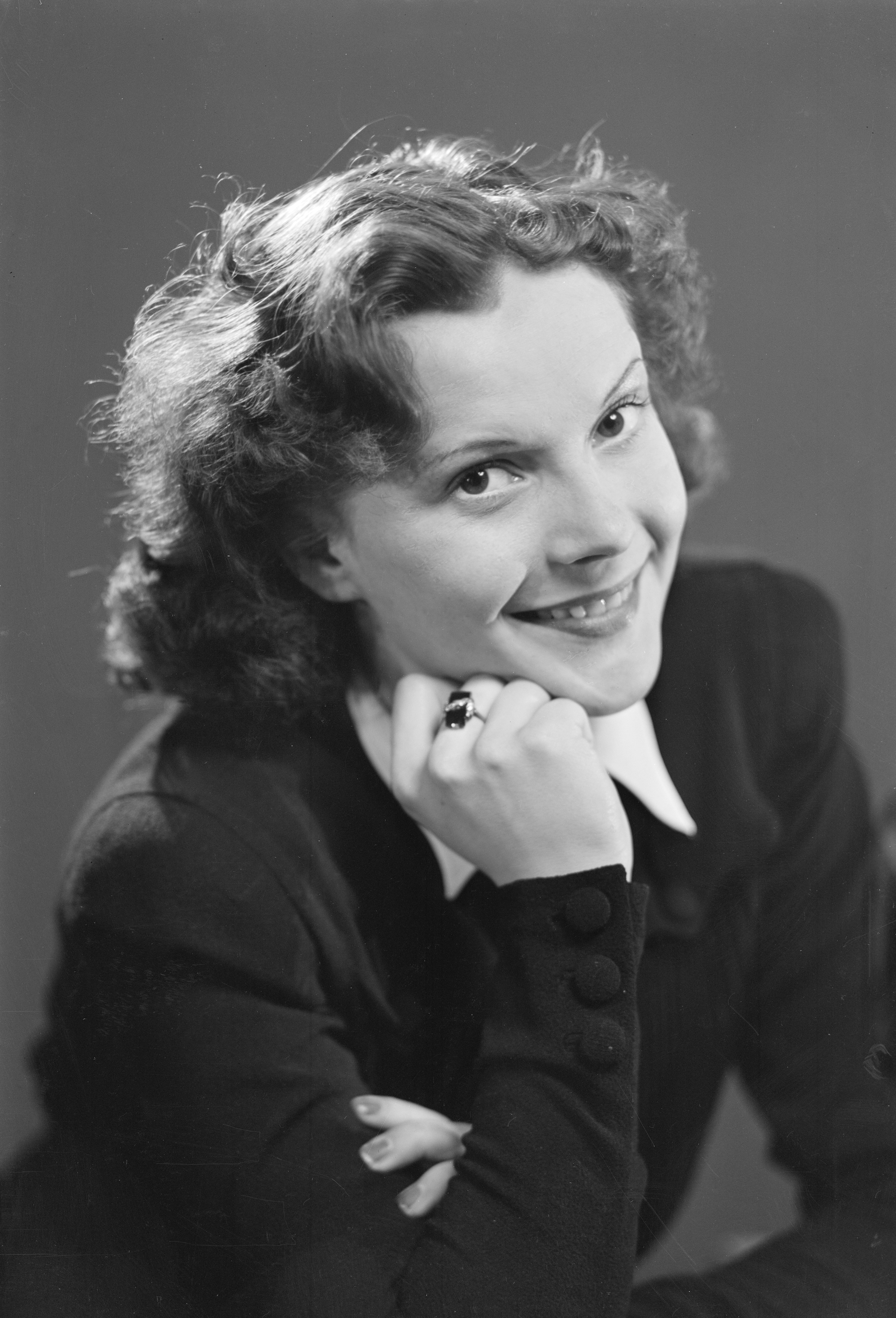 näyttelijätär Eija Karipää; pysty, mustavalkoinen